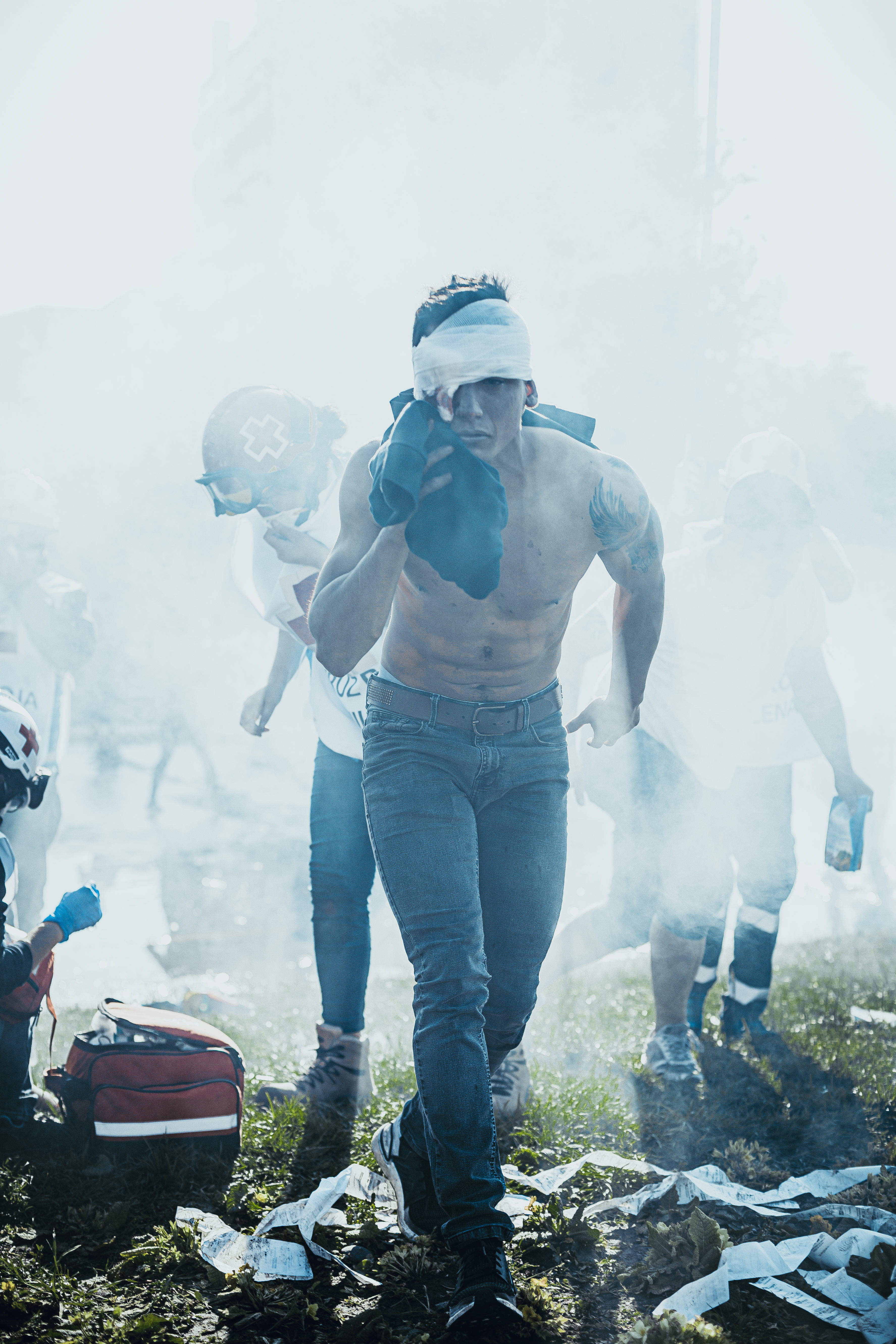 Un manifestante es obligado a retirarse por una lacrimógena del lugar donde lo está atendiendo la Cruz Roja.